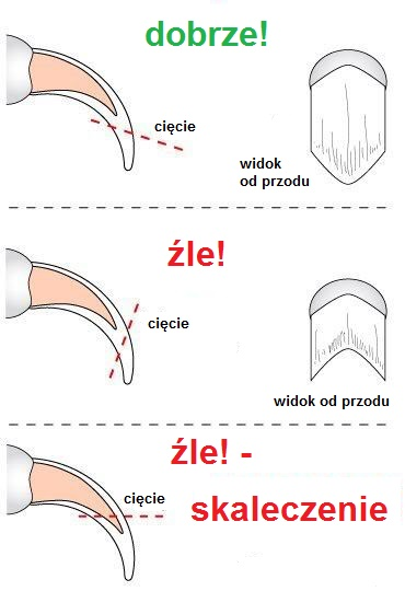 Sposób obcinania pazurów u gryzoni